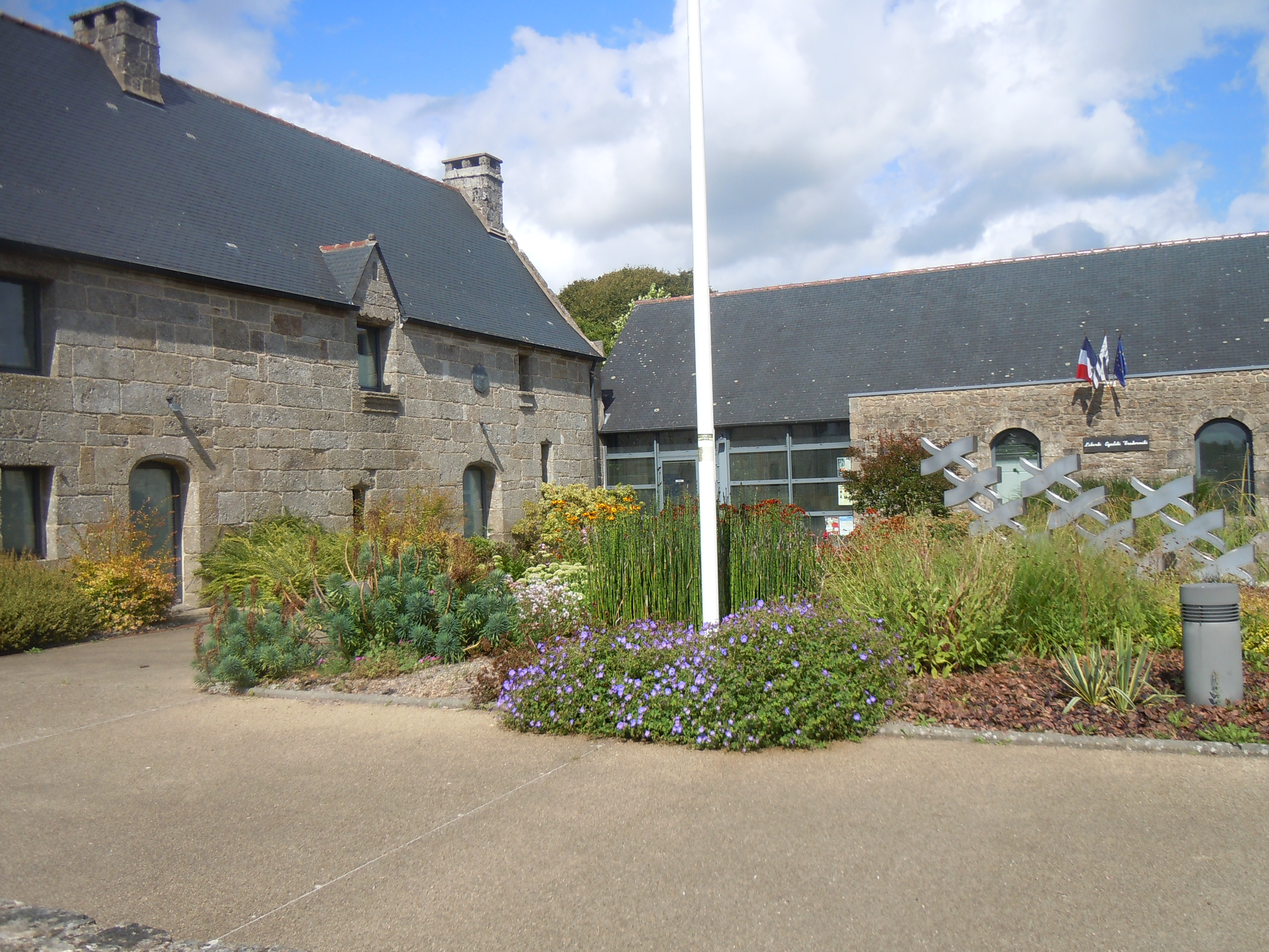 la mairie de Glomel (département des Côtes d'Armor)